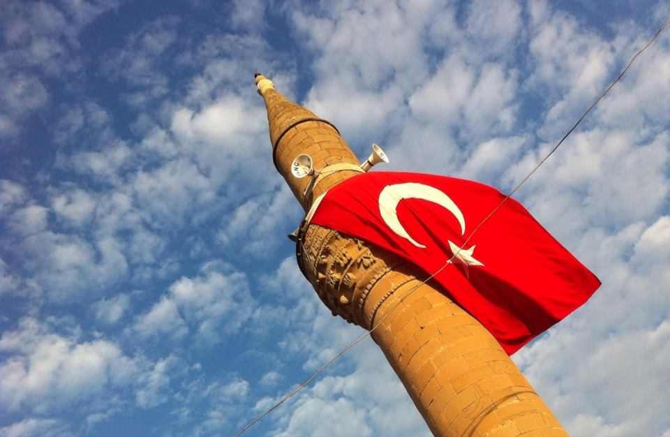 Bozoğlak-Kemah- Minare-Erzincan